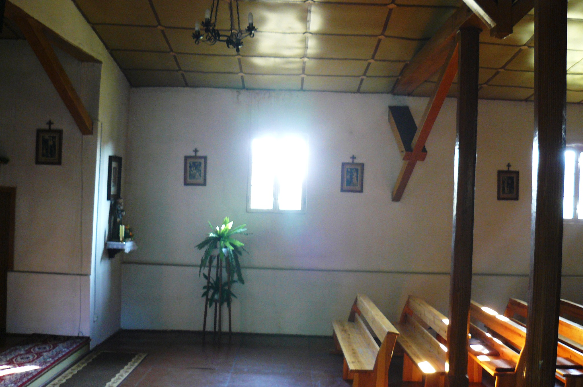 Kościół Najśw. Serca Pana Jezusa w Krobielewku.